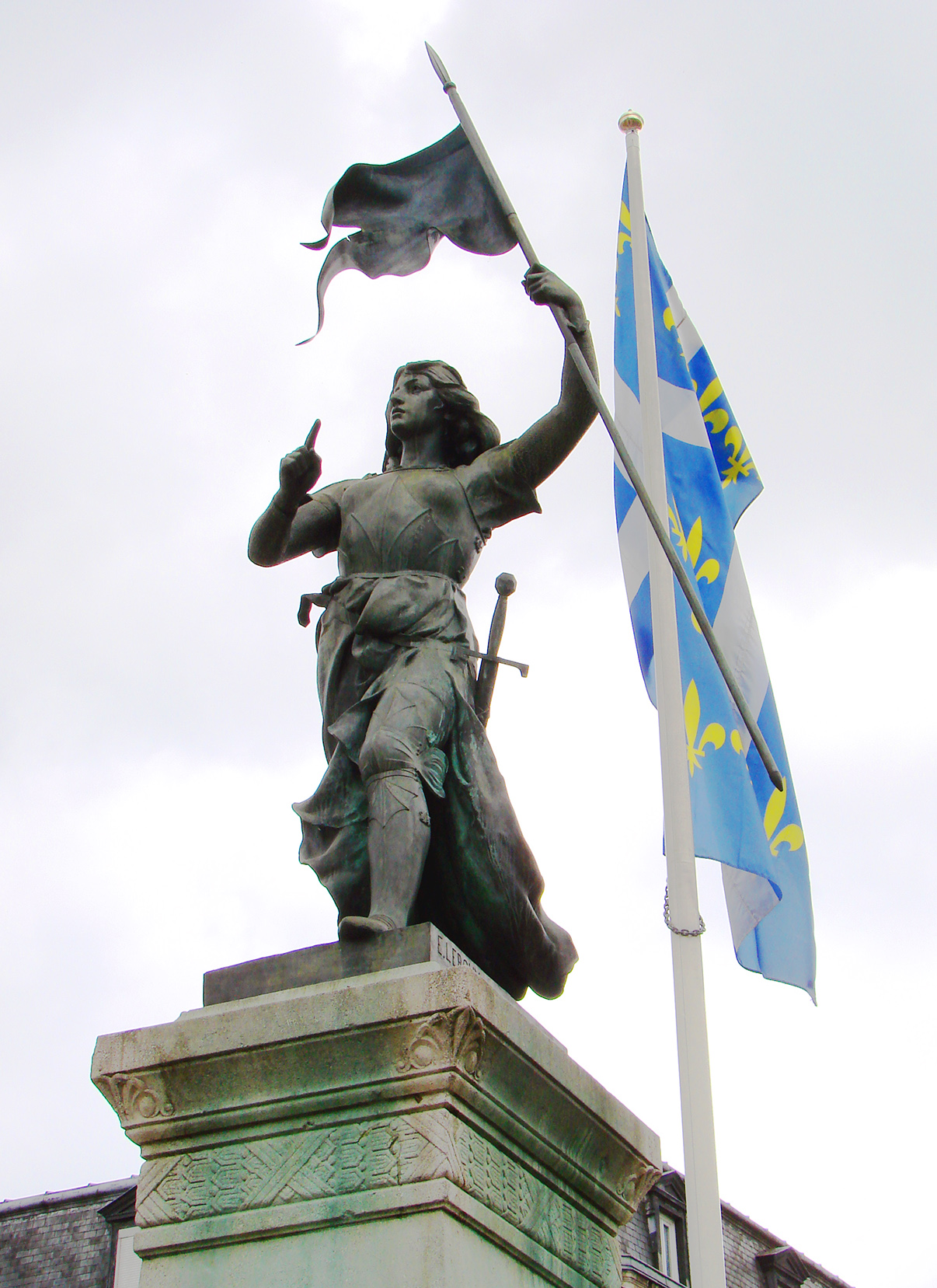 Statue de Jeanne d'Arc (1879/80) par Étienne Leroux, érigée à Compiègne, face à l'Hôtel de Ville. Réalisée à Paris, dans l'atelier Leroux, 99 rue de Vaugirard et coulée d'un seul jet, sauf pour les bras, chez les fondeurs Thiébault frères.